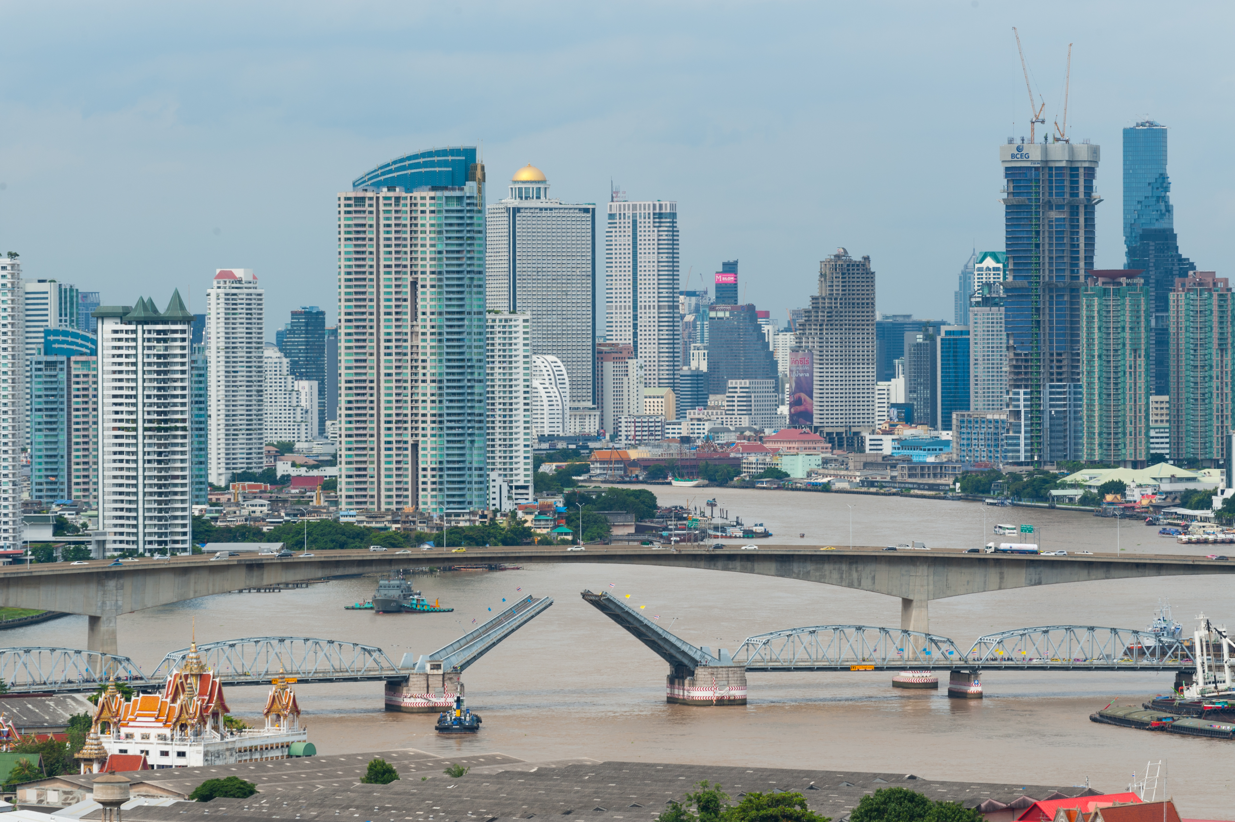 สะพานกรุงเทพเปิด